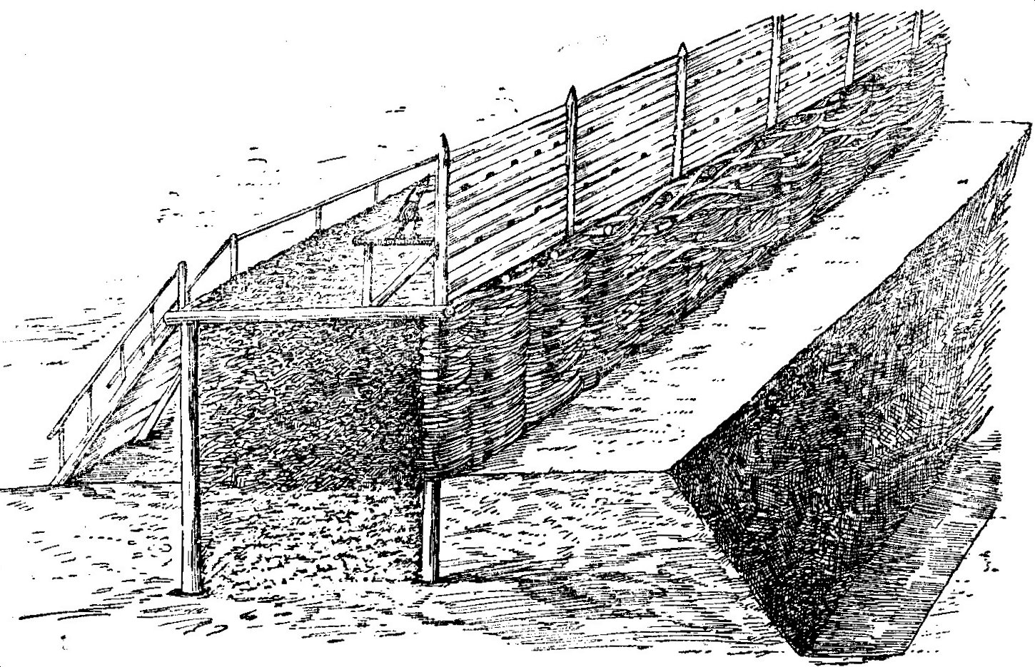 Стена Китай-города в 1534 году (графическая реконструкция).